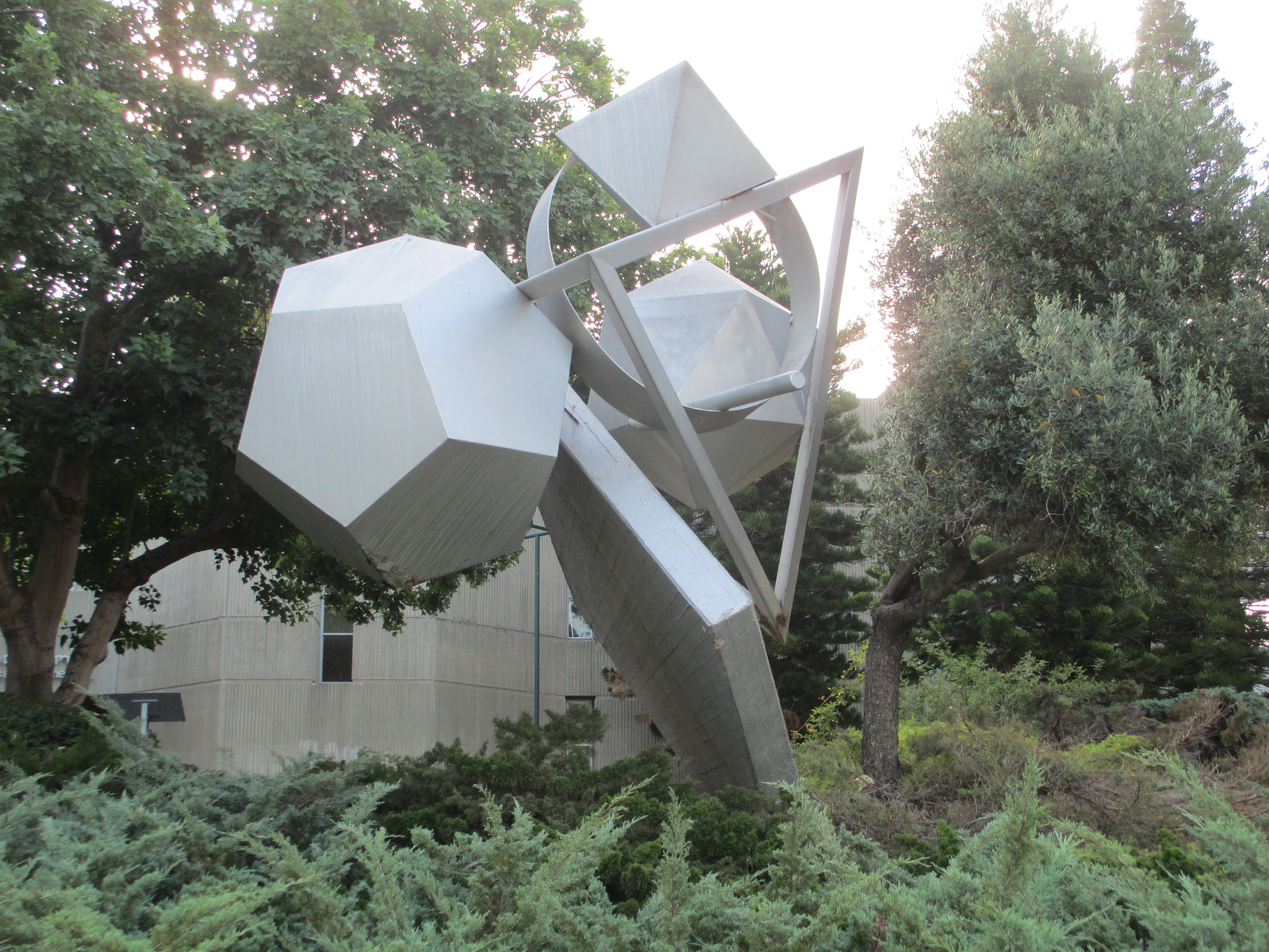 מחווה ליוהנס קפלר של יגאל תומרקין